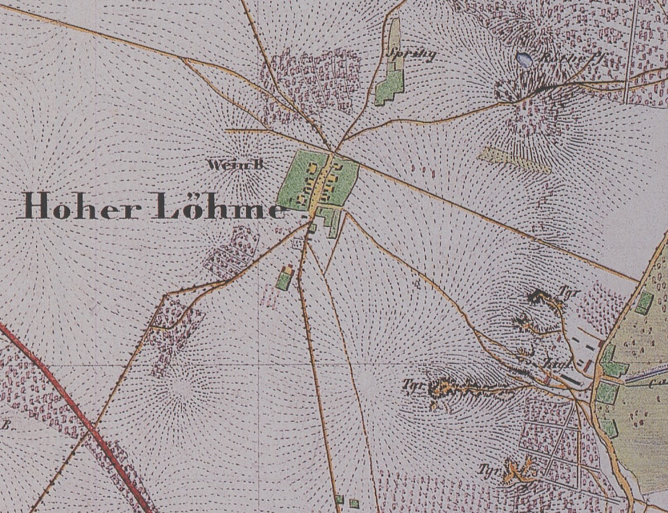 Hoherlehme, Gemeindeteil der Stadt Wildau, Lkr. Dahme-Spreewald, Brandenburg, Ausschnitt aus dem Urmesstischblatt von 1839